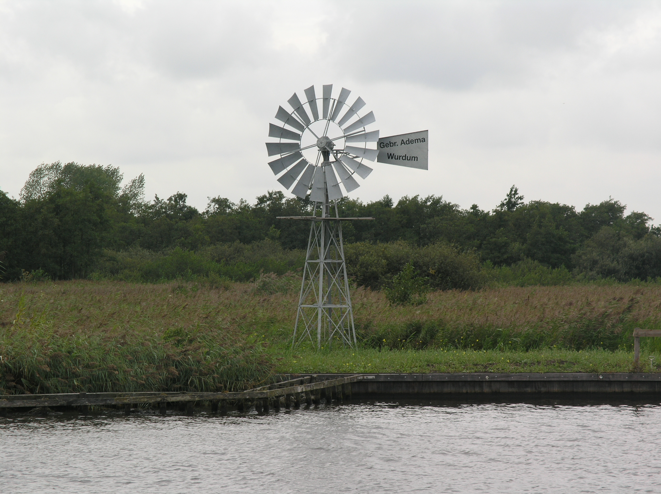 Eernewoude Windmotor Hooidamsloot